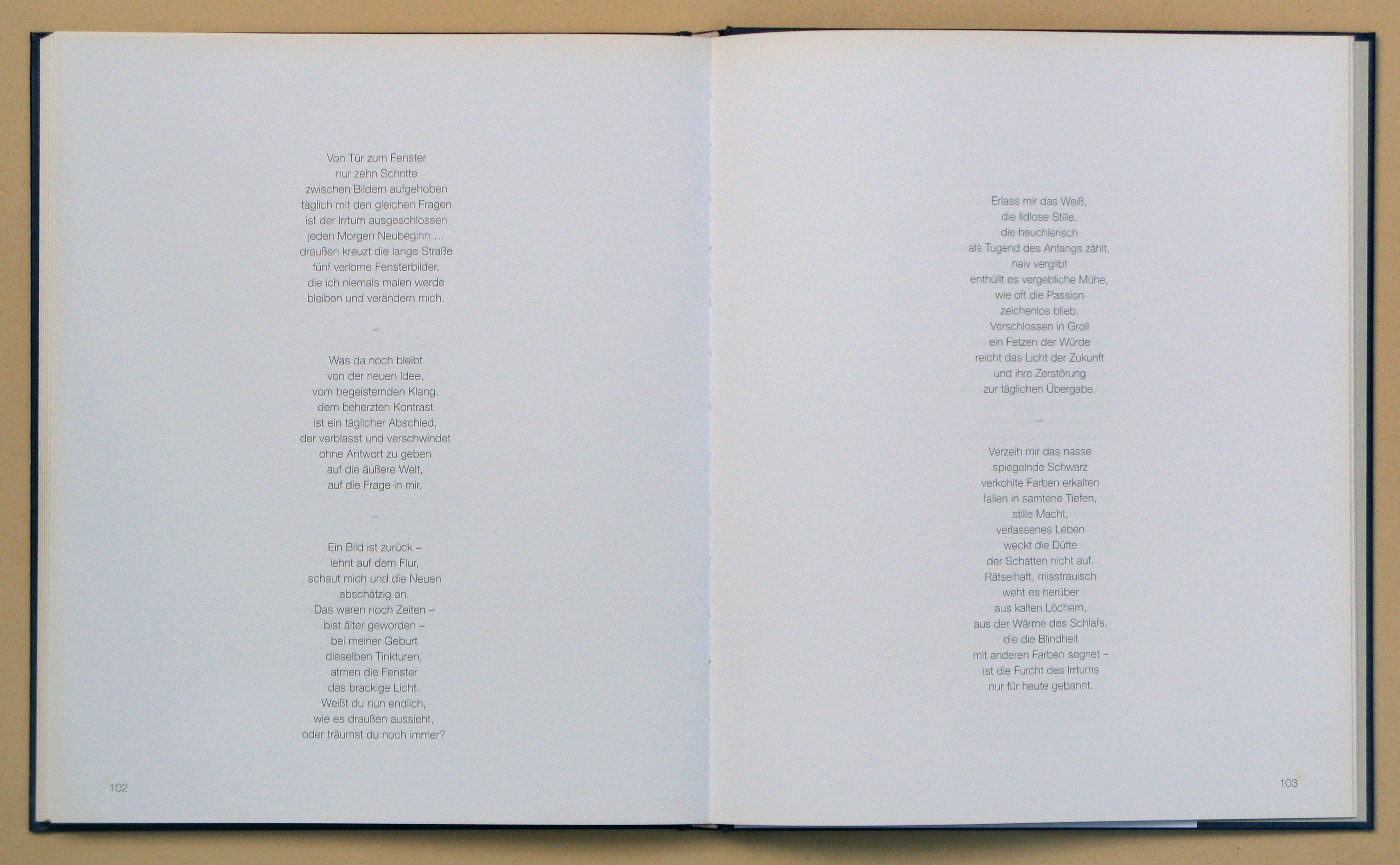 Gedichte des Künstlers Wilhelm Beuermann